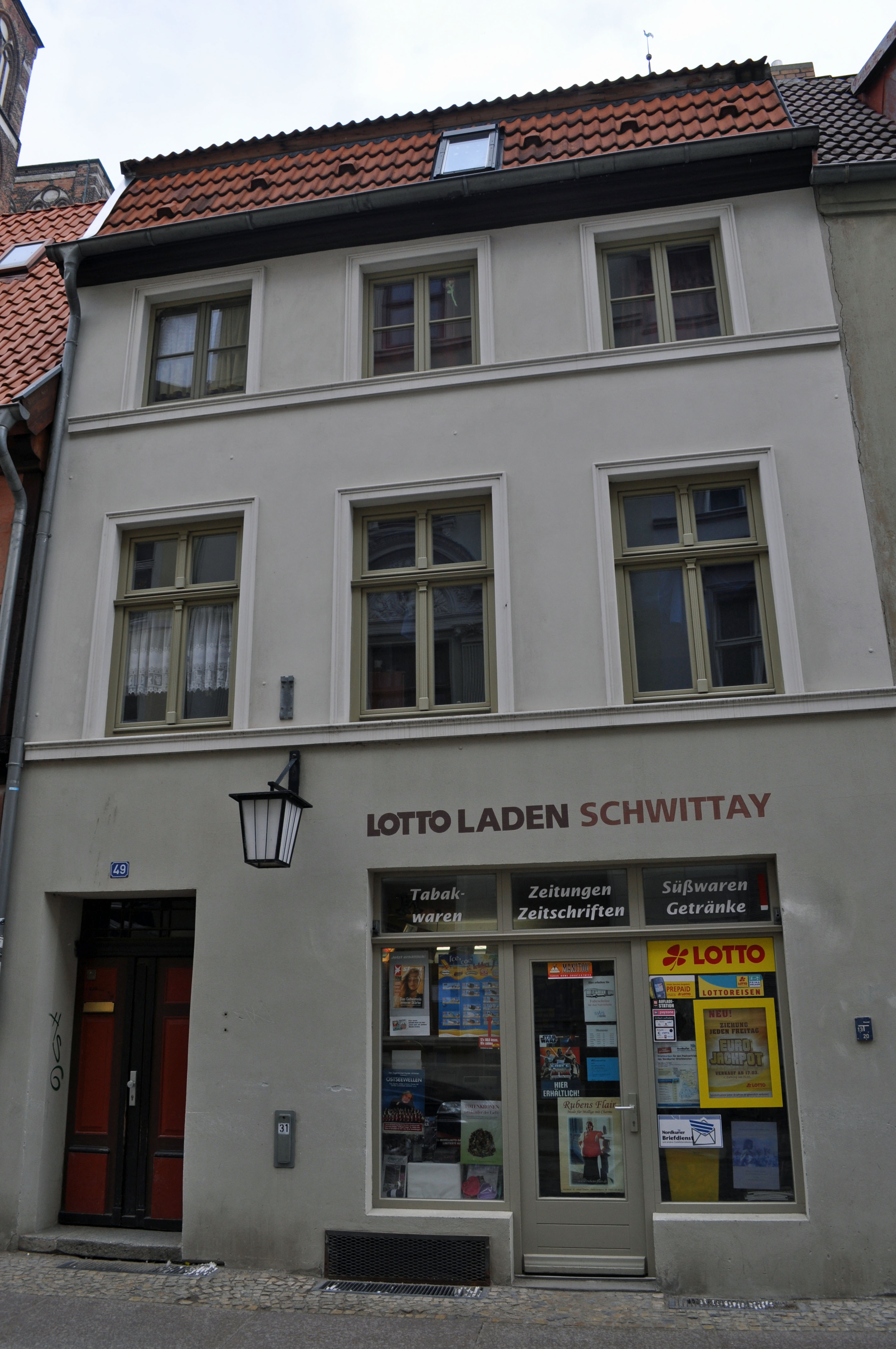 Gebäude bzw. Gebäudedetail in Stralsund. Straße und Hausnummer siehe Dateiname.